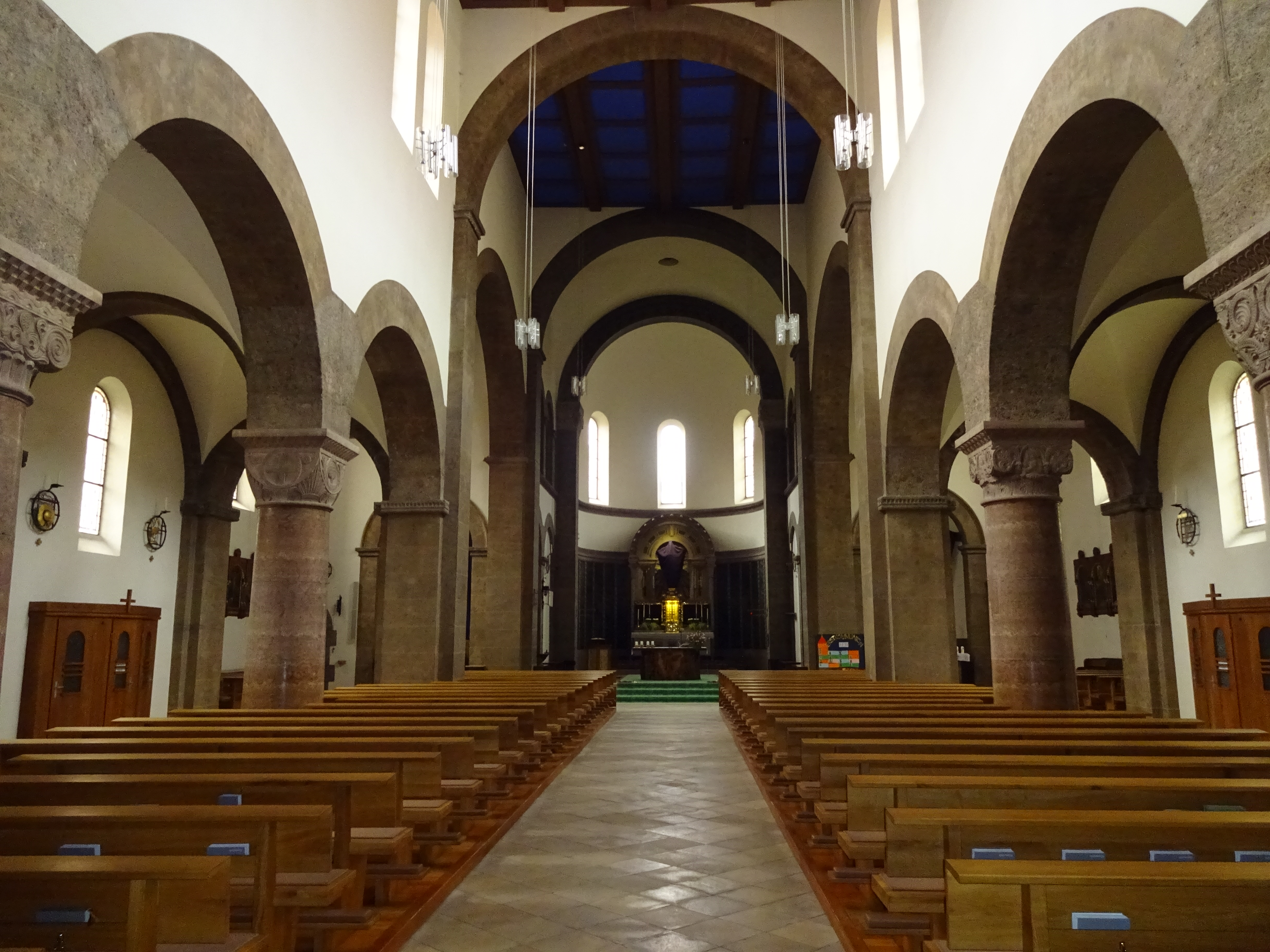 Pfarrkirche Pradl: Blick von der Vorhalle durch das Langhaus zum Chor This media shows the remarkable cultural object in the Austrian state of Tyrol listed by the Tyrolean Art Cadastre with the ID 16406. (on tirisMaps, pdf, more images on Commons, Wikidata)